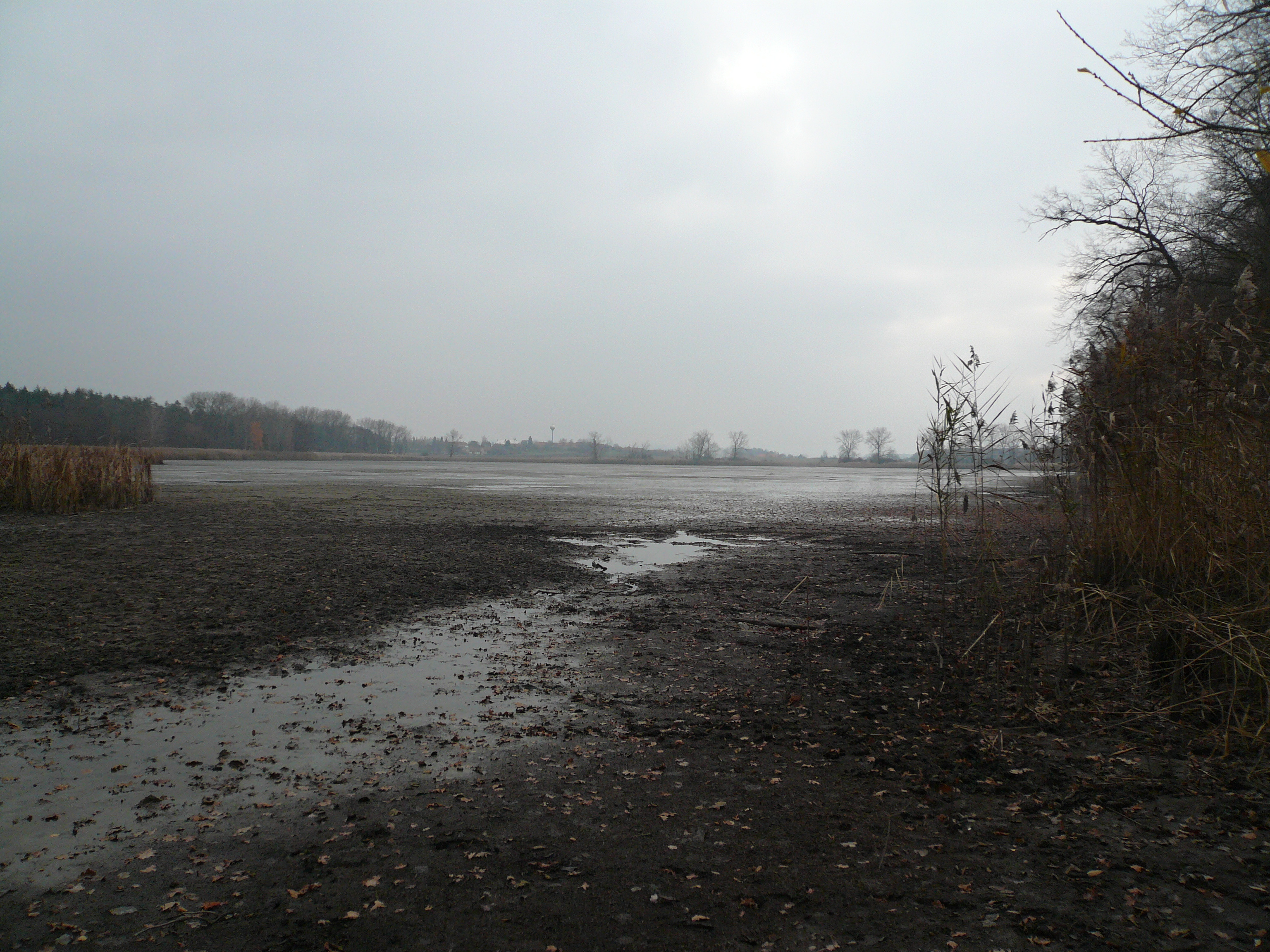 Lodrantský rybník